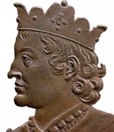 Portrait du Roi de france Clotaire III. Auteur Dassier, Jean (1676-1763 ; médailleur) Titre Médaille Publication [Paris], [ca 1720] Description : bronze ; 31 mm ; 15,87 g Licence: GPL et GFDL Notes Acq. 95-0642 Cote : BNF Richelieu Monnaies, médailles etantiques exemplaire unique L'ensemble est conservé dans deux boîtes cylindriques en buis. Tranche cannelée Identifiant 07700013 Détail du contenu : No d'image 1 Titre Clotaire III. roy de France. Notes 1720 Sujet(s) Clotaire (657-673 ; roi de Neustrie :III:+03+ Modifié par Rinaldum 12 jan 2004 à 11:51 (CET) Image trouvé sur le site internet Gallica de la BNF